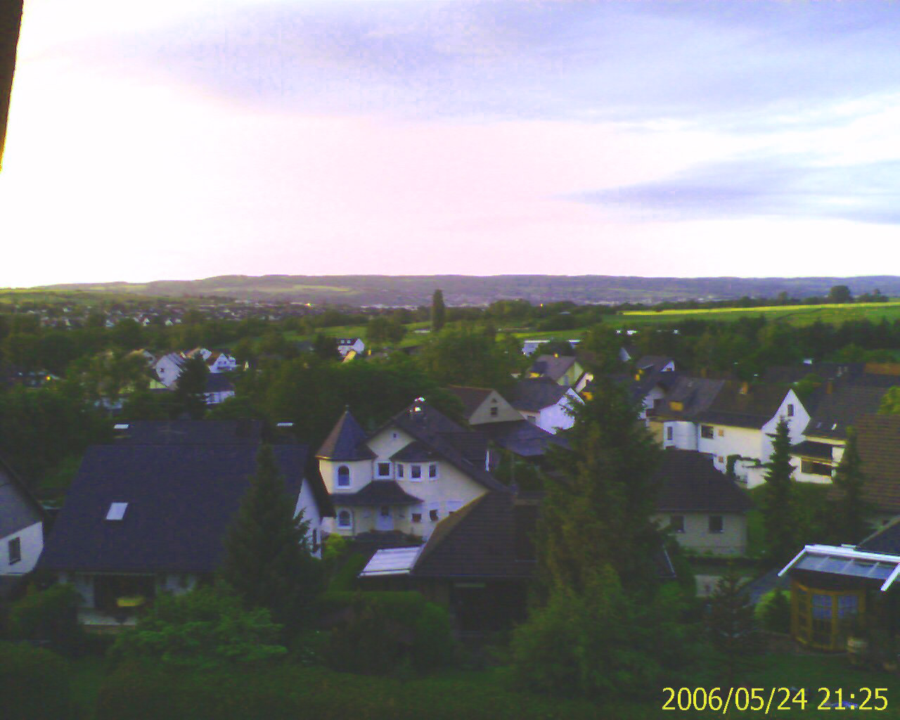 Saffig, background: Andernach, Plaidt